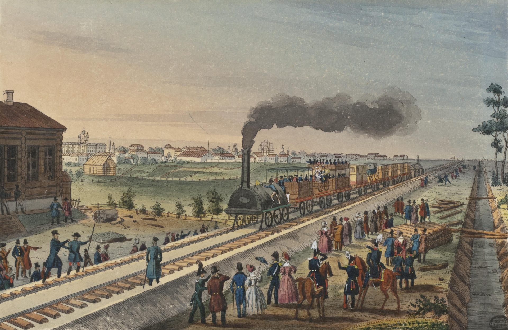 Акварель на тему первой российской железной дороги